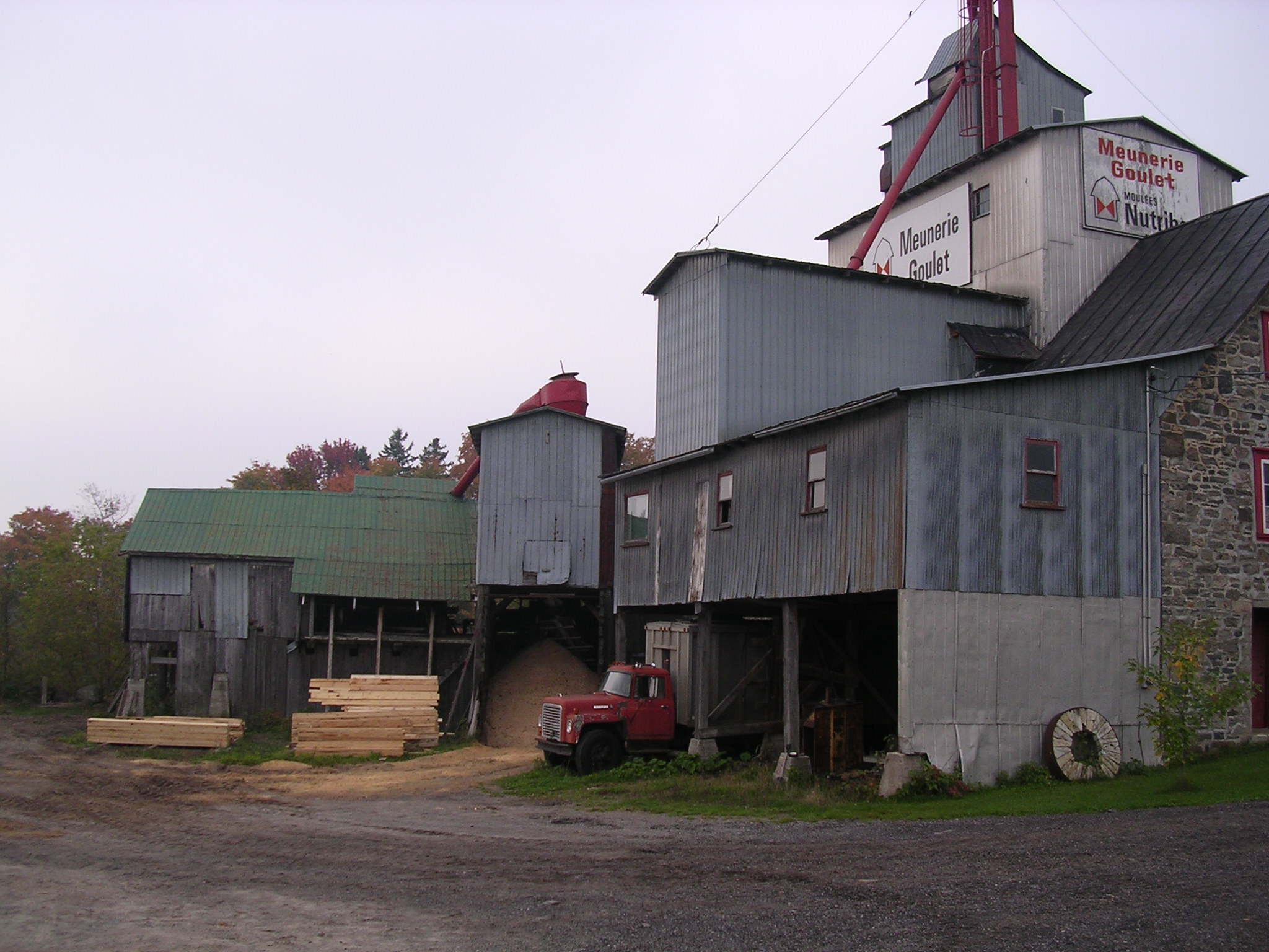 Moulin Goulet, situé sur la rivière des Envies à Saint-Stanislas (Mauricie, Québec). Moulin à eau; moulin à farine; meunerie; moulin à scie.